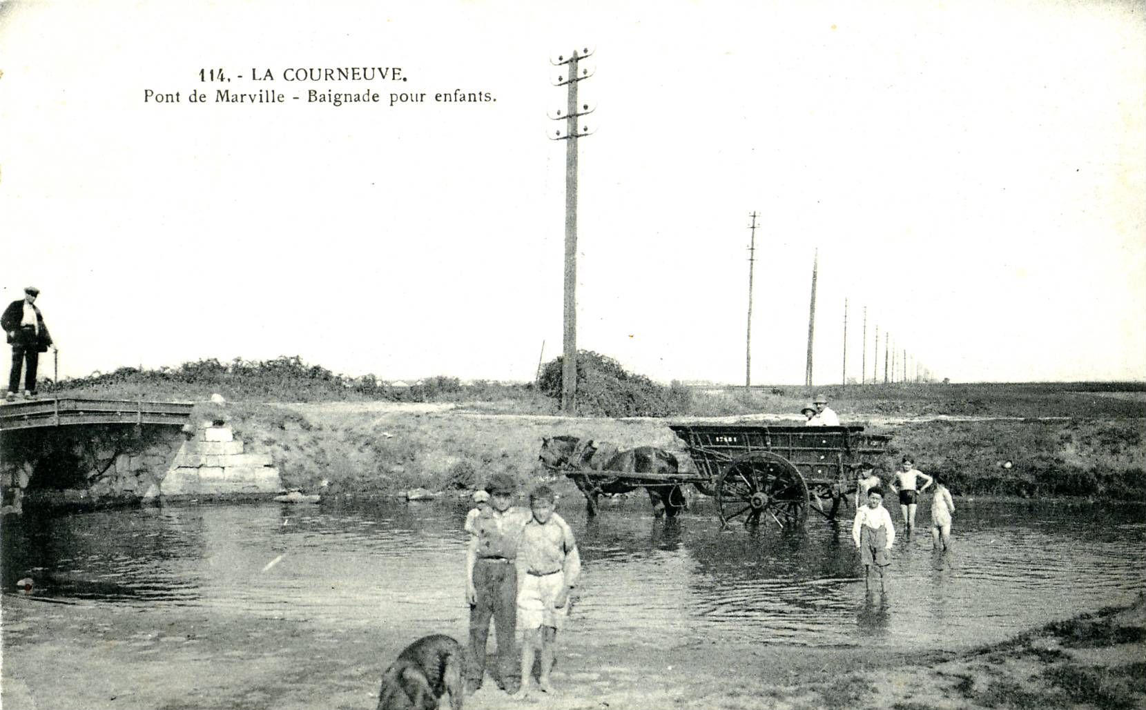 Carte postale ancienne du Croult à La Courneuve, éditée par La Cigogne.